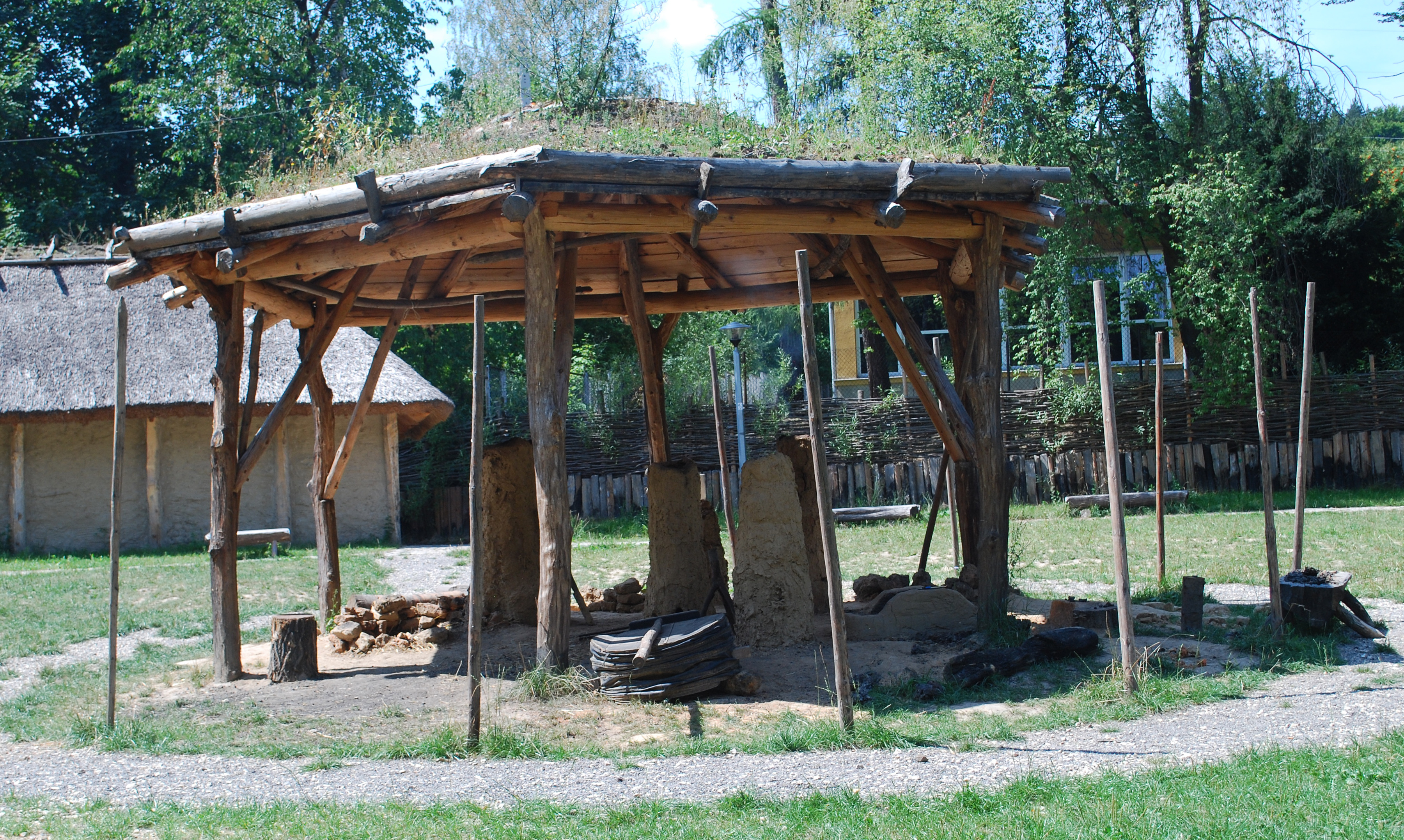 Centrum Kulturalno-Archeologiczne w Nowej Słupii: Wiata z dymarkami